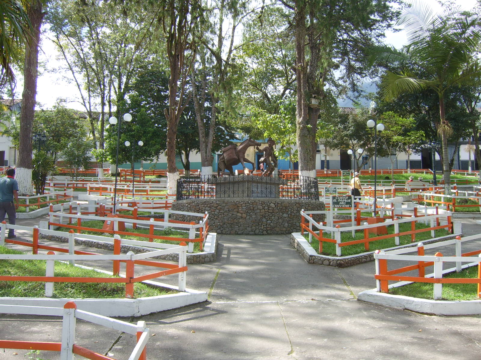 Patque Principal del Municipio de Argelia, Antioquia, Colombia.